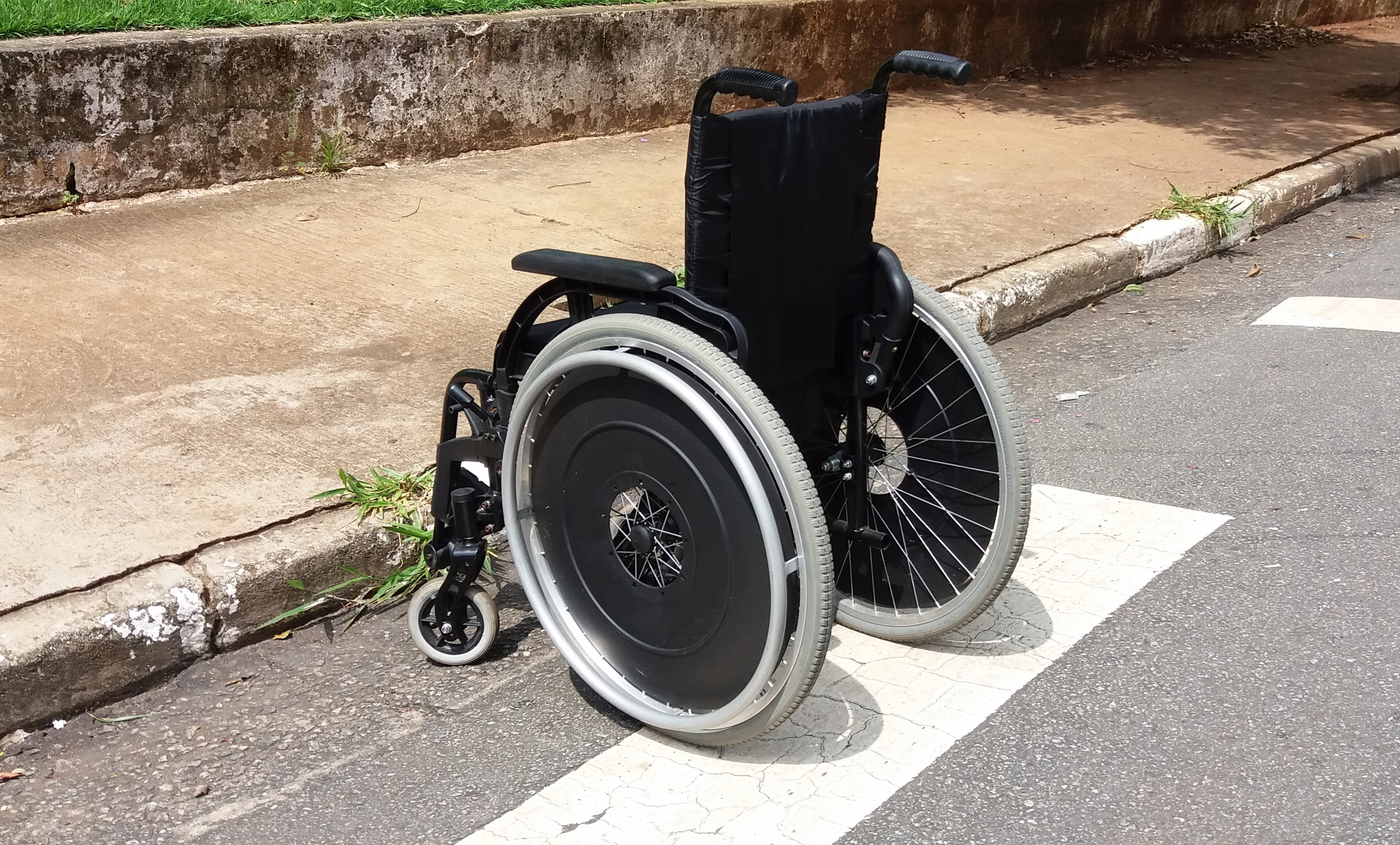 Cadeira de rodas em uma faixa de pedestre no bairro do Ipiranga em São Paulo, SP.